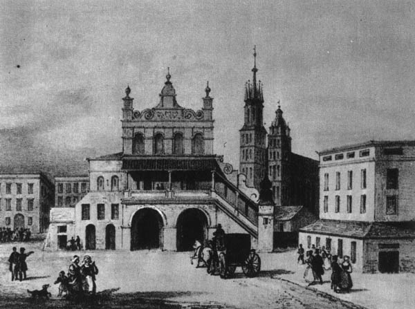 Sukiennice, i tzw. Komisja. Litografia.